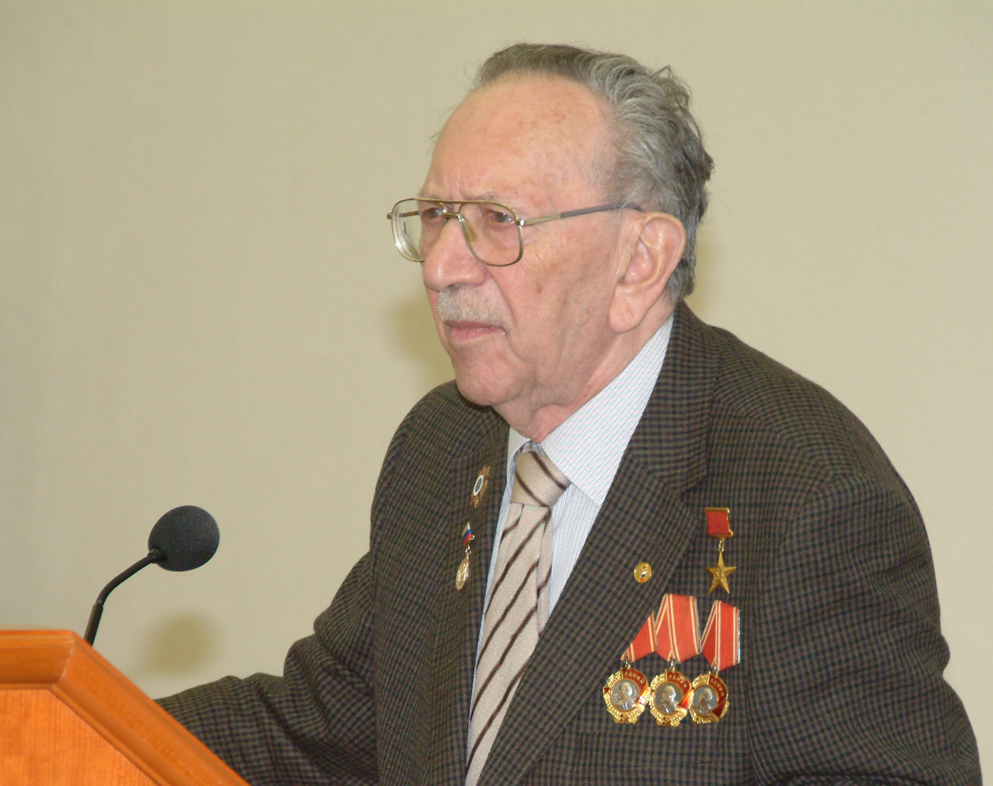 Штейман